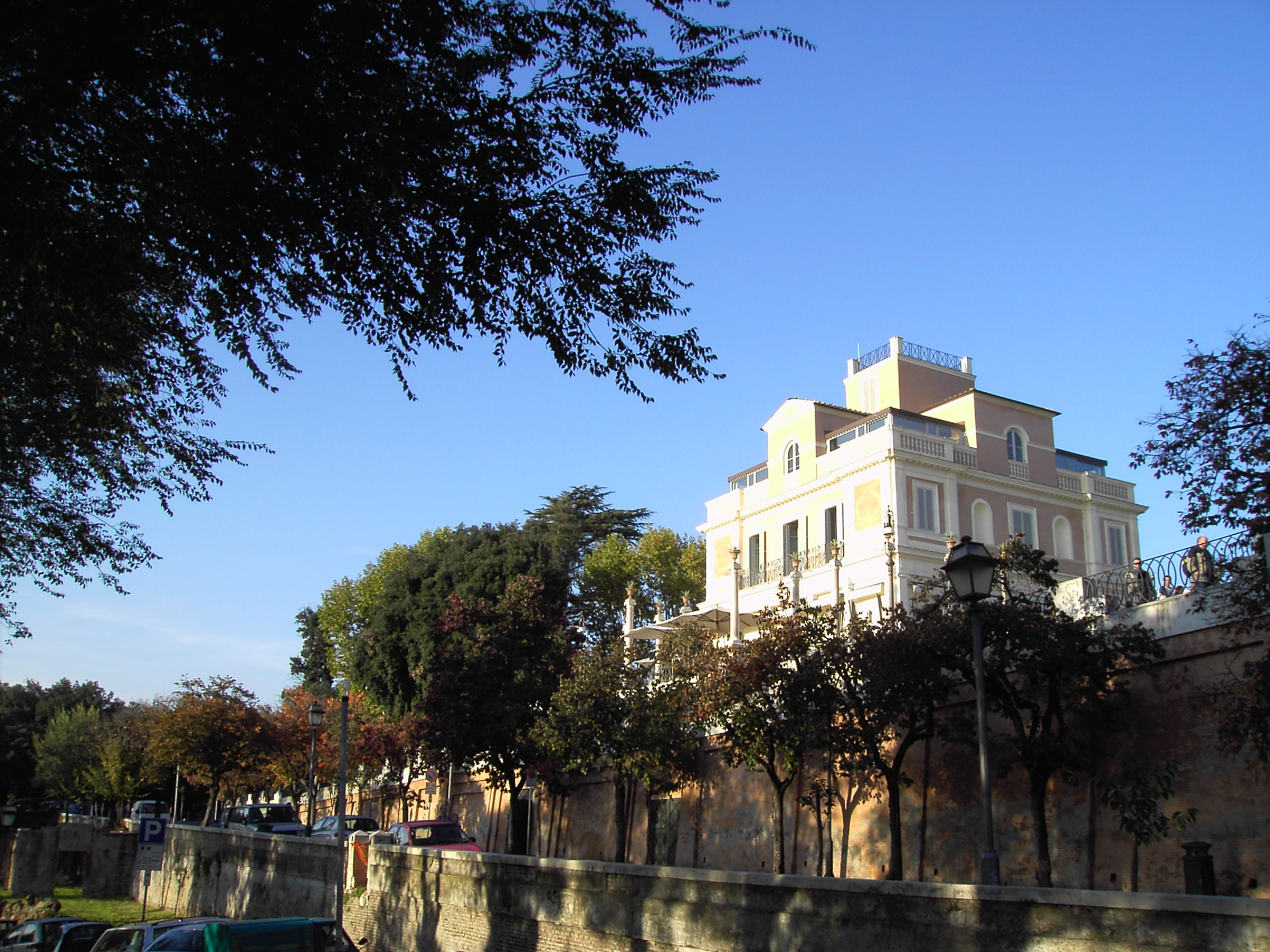 Roma, Pincio: la Casina Valadier.